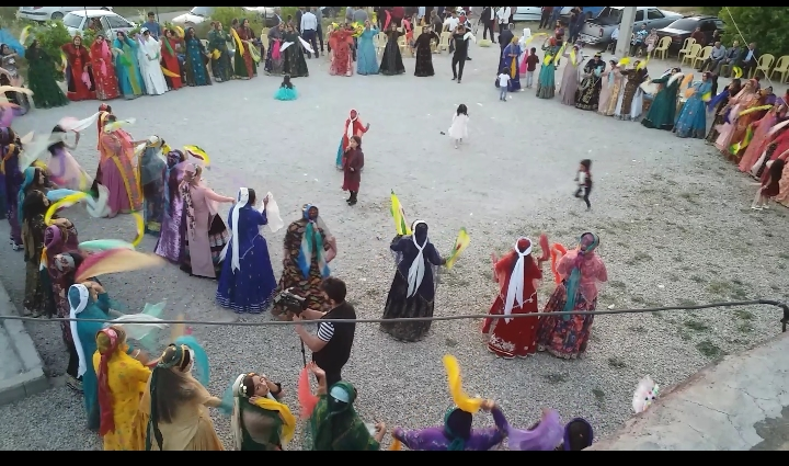 Handkerchief dance by Southern Lurs in Dehdasht